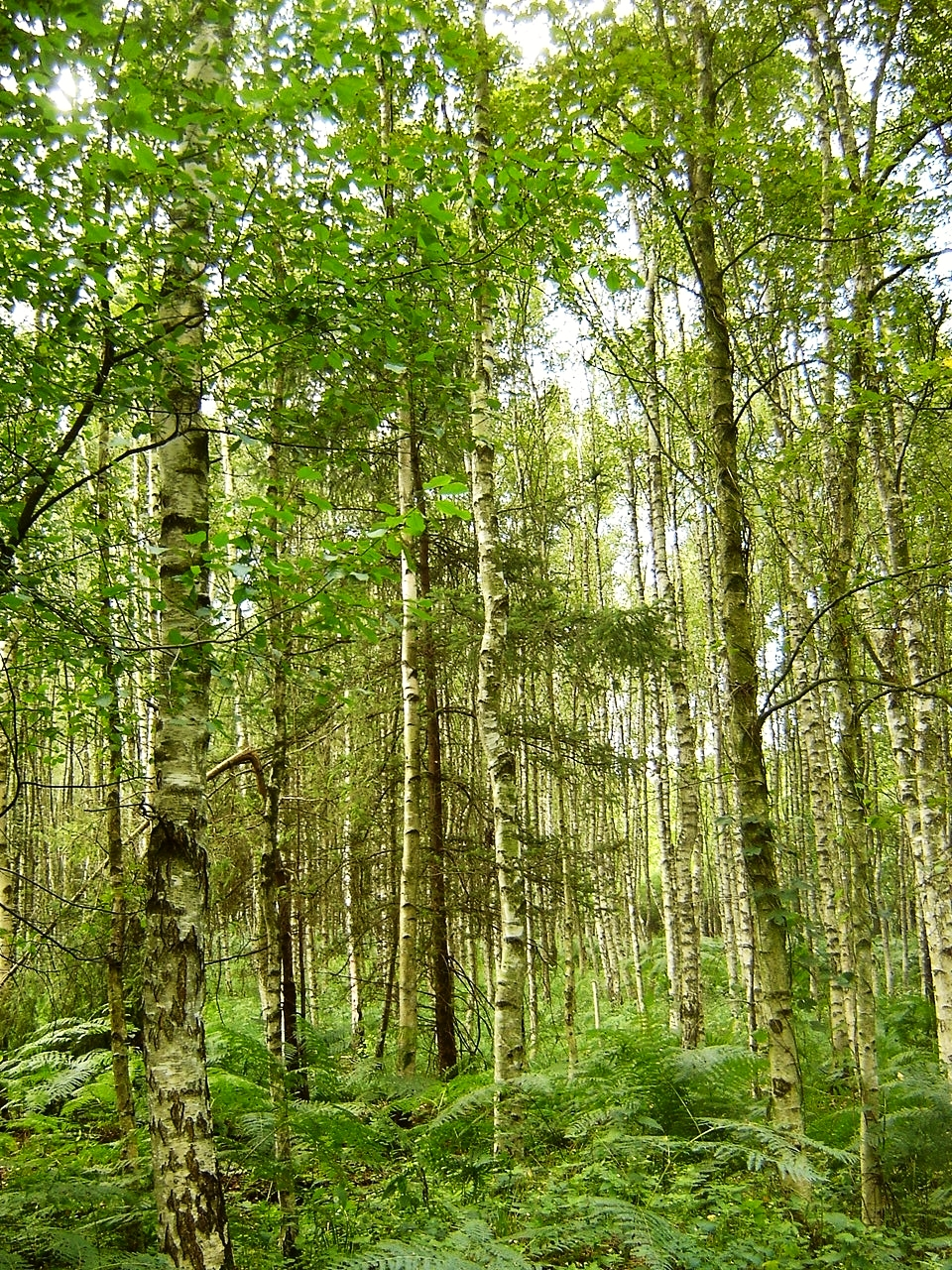 Wald im Endinger Bruch (bei Lendershagen, Landkreis Nordvorpommern).